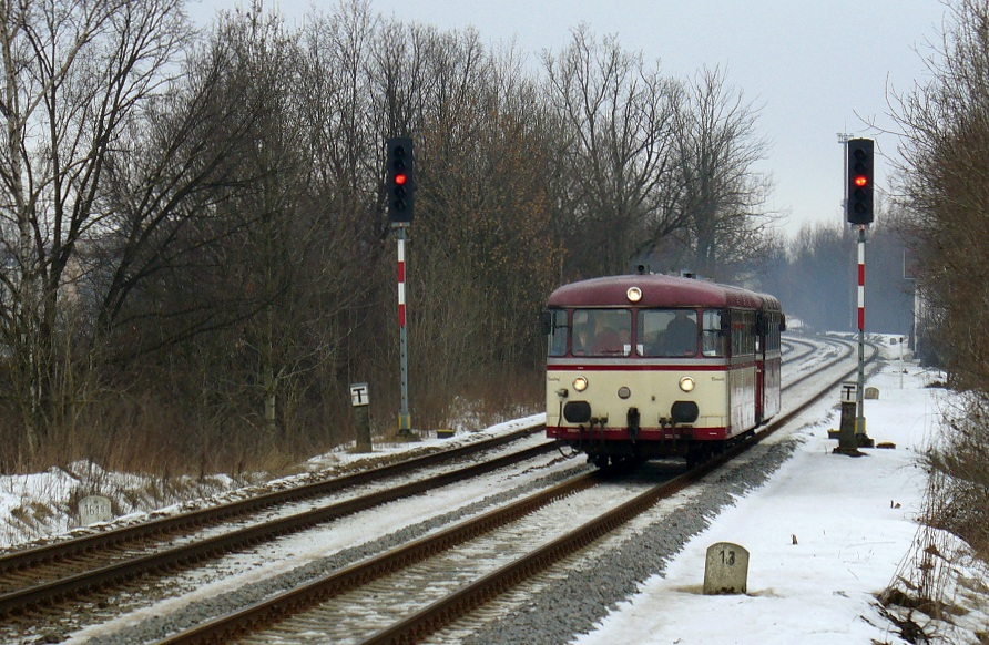 Osobní vlak společnosti Railtransport do Žitavy projíždí vjezdová návěstidla stanice Liberec. Vlevo trať bývalé Jihoseveroněmecké spojovací dráhy do Zawidówa, na které je kilometráž počítána od Pardubic.